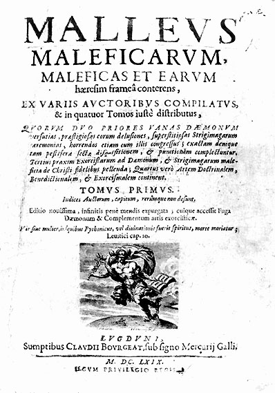 Malleus maleficarum, Lyon 1669